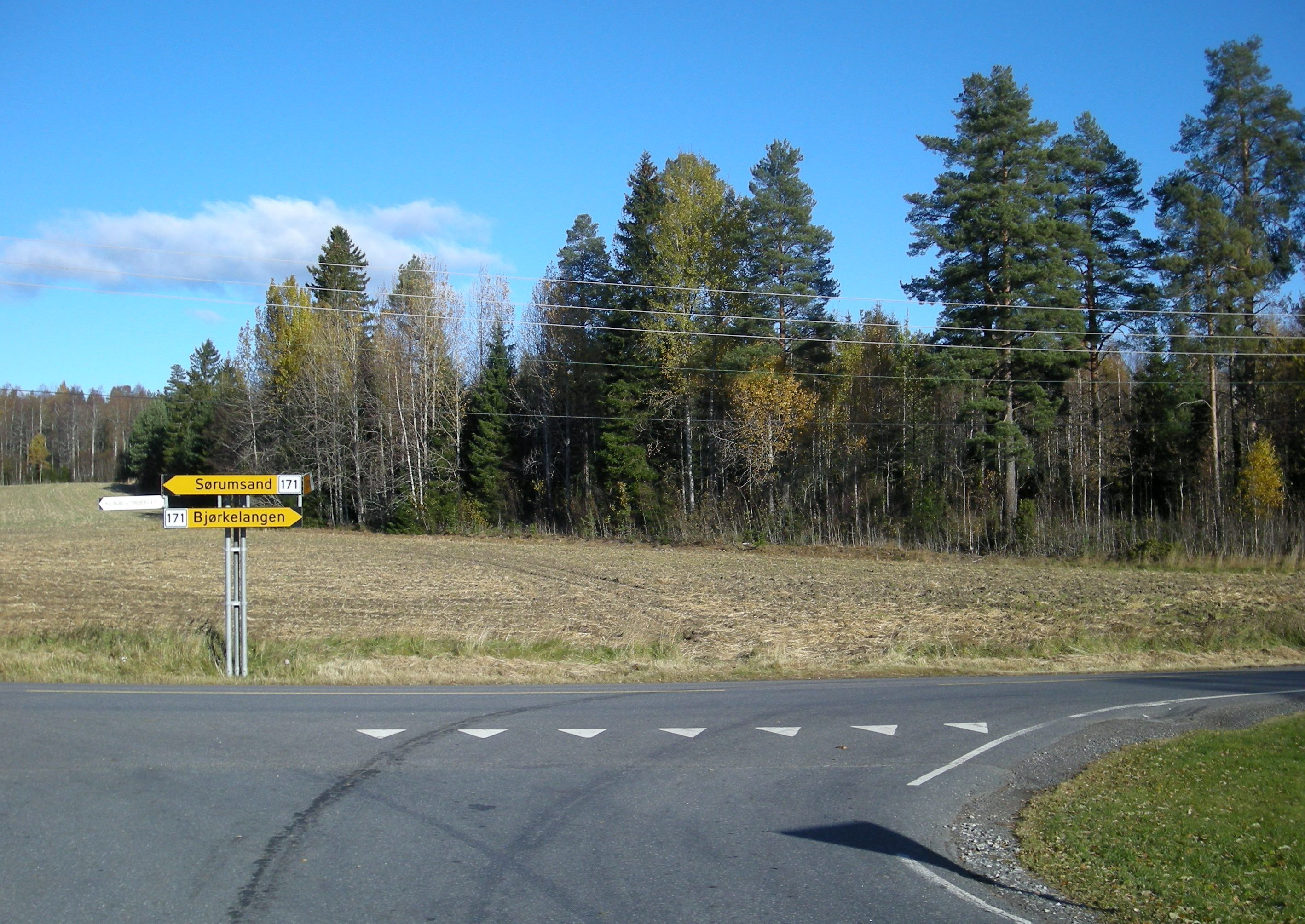 Fylkesvei 171 ved Killingmo, sett fra FV238